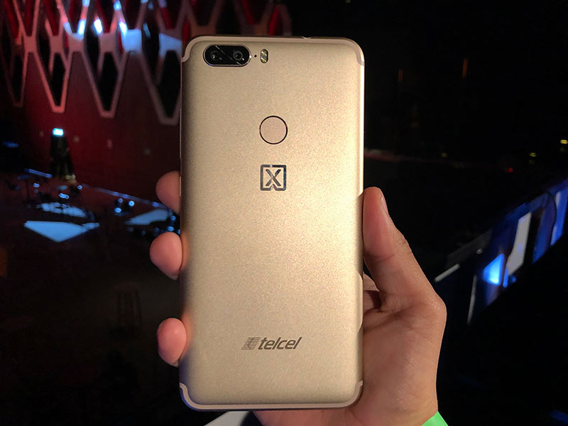 Diseño trasero de Lanix L1400